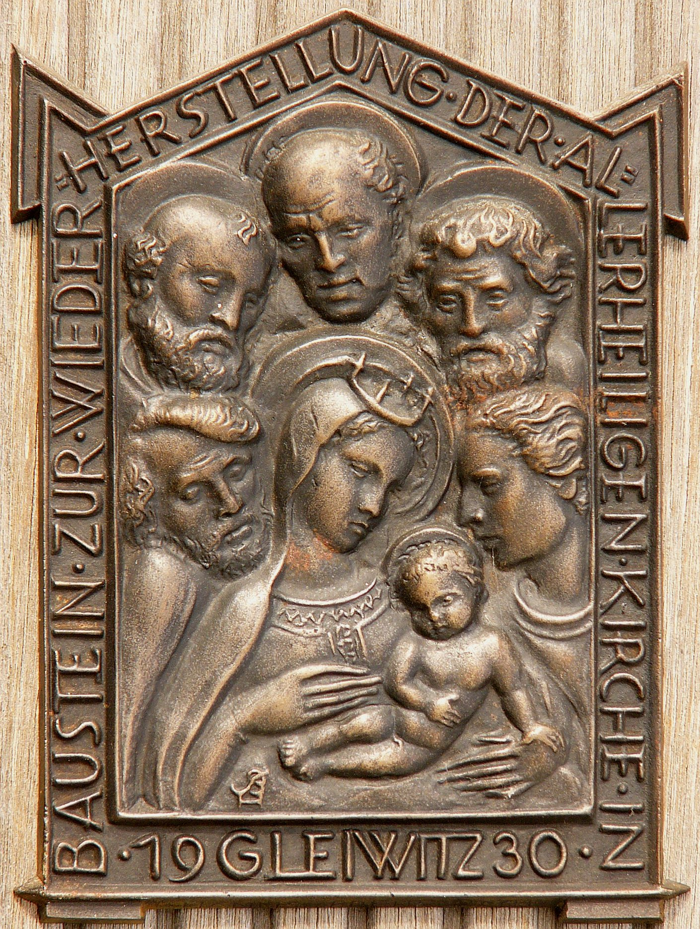 Spendenplakette zur Erneuerung der Allerheiligenkirche Gleiwitz, [16] symbolischer Baustein, 500 x in Eisen, 300 x in Bronze.